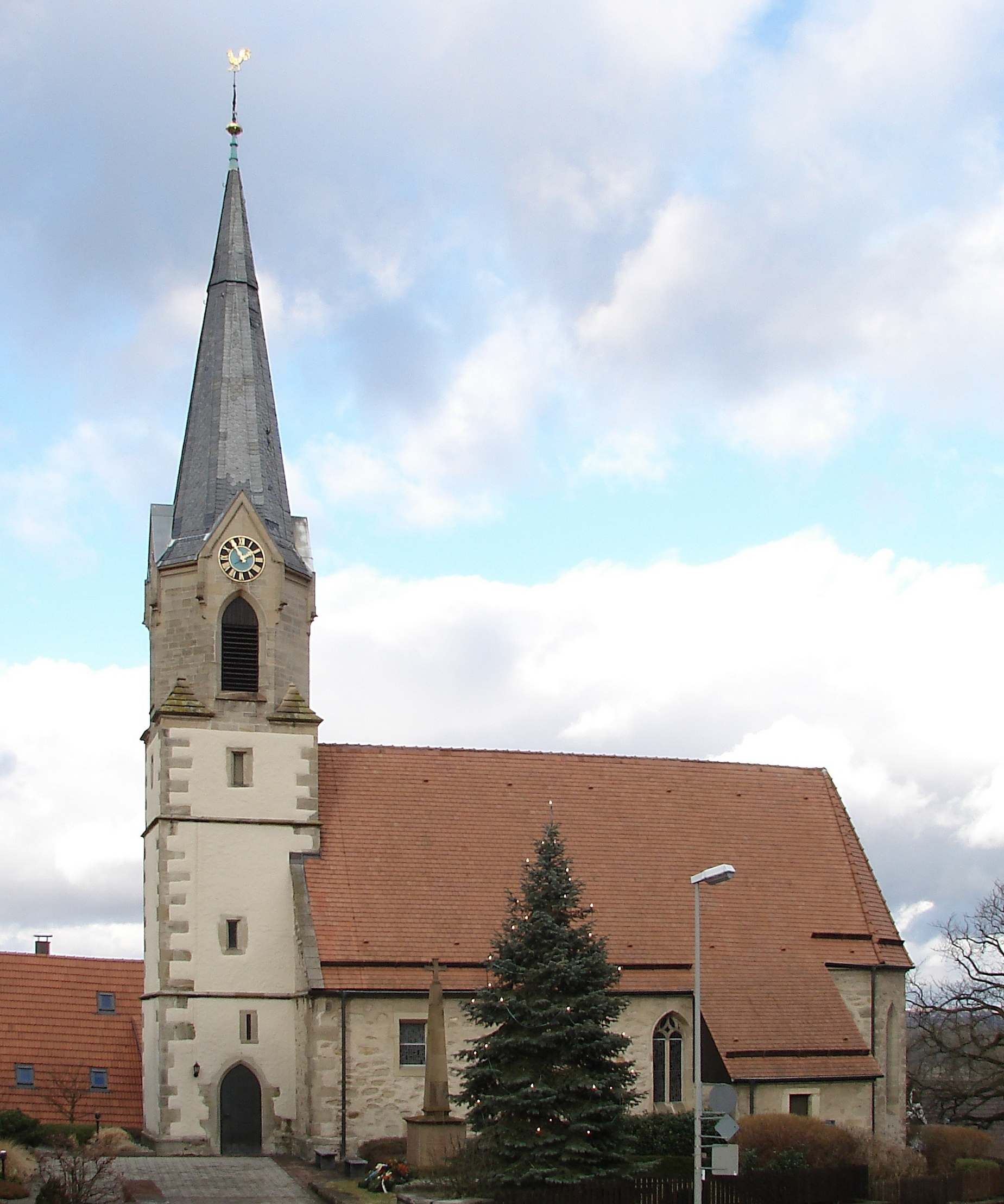 Freiberg am Neckar, St. Nikolaus church of 1701